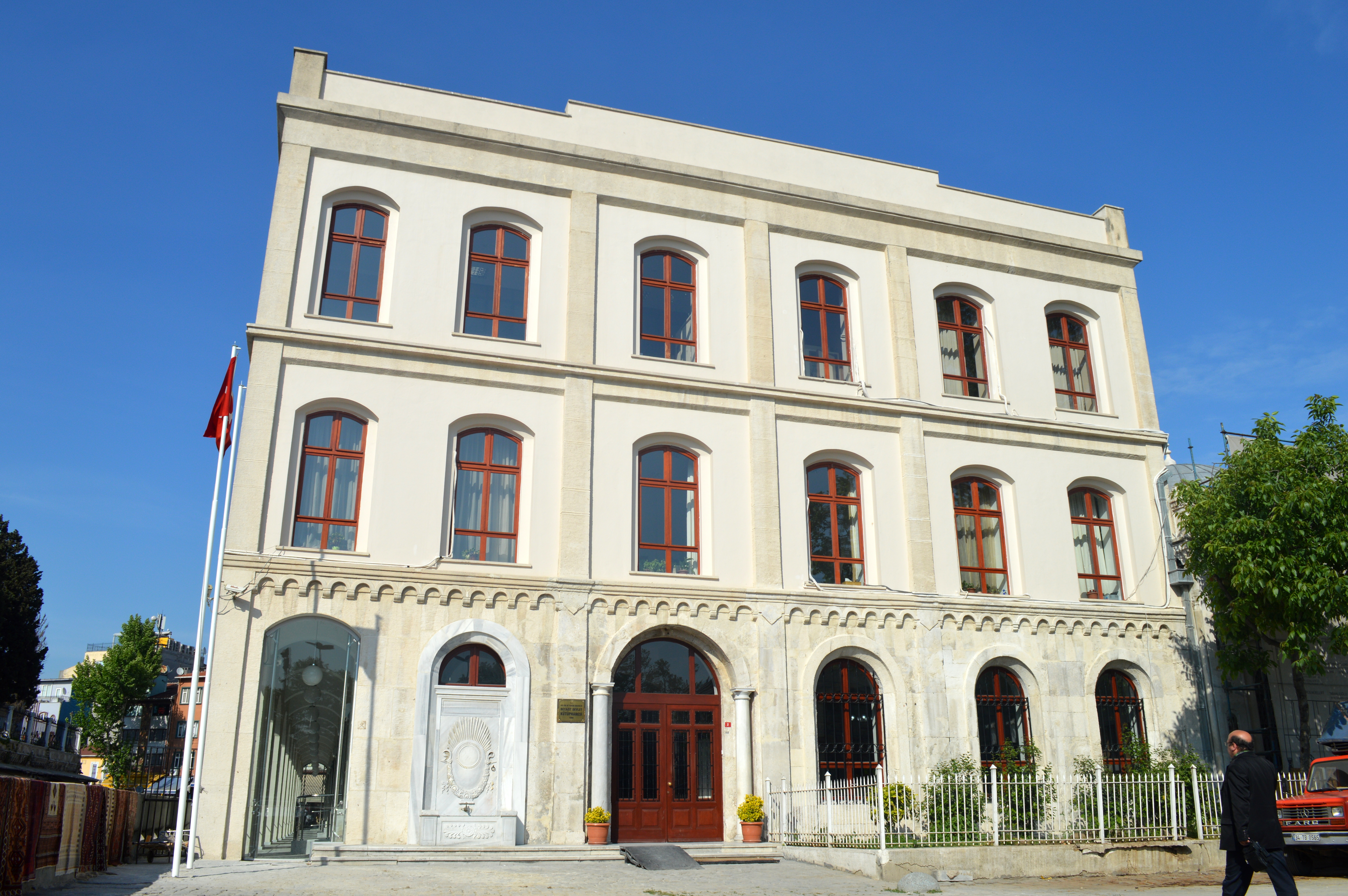 Beyazıt Devlet Kütüphanesi